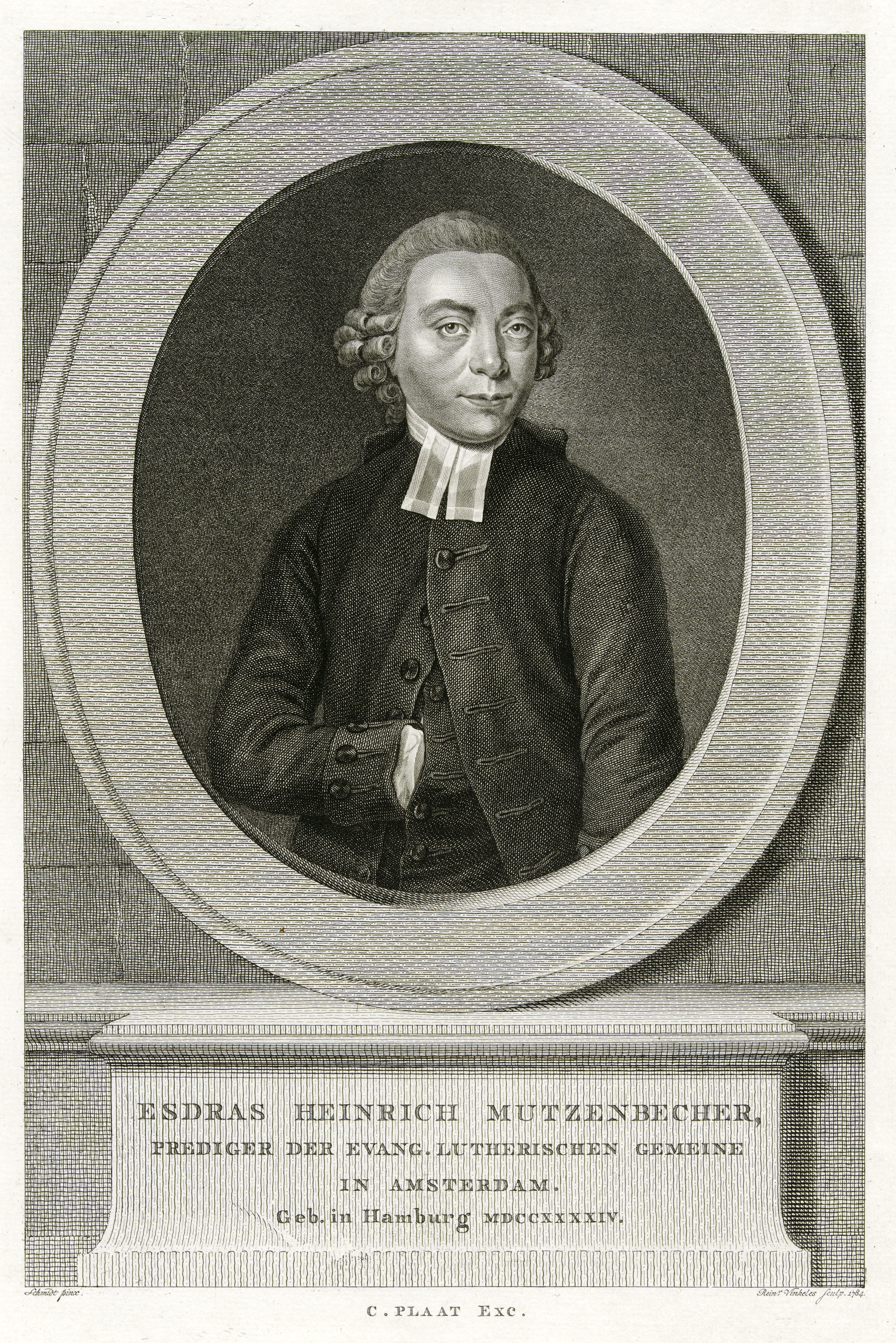 Esdras Heinrich Mutzenbecher, Prediger der Evang. Lutherischen Gemeine in Amsterdam